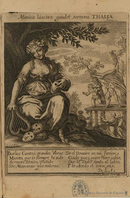 Thalia, estampa calcográfica incorporada a Francisco de Quevedo, El Parnasso español, Madrid, Diego Díaz de la Carrera, 1648. Grabado al aguafuerte de Herman Panneels sobre un dibujo de Alonso Cano